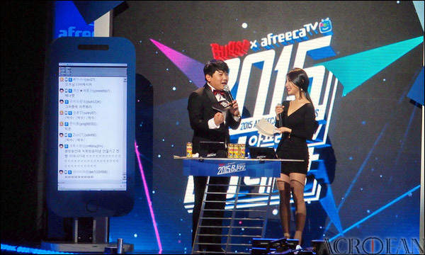 2015년 '아프리카TV BJ대상'의 MC를 맡고 있는 최군과 박현서